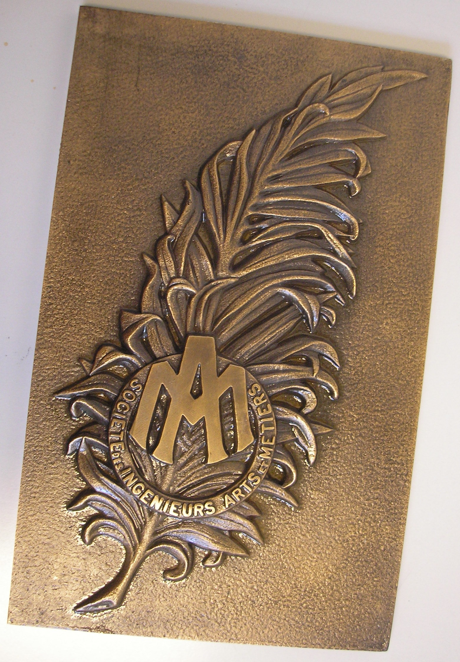 Palme déposée sur la tombe des gadzarts par les anciens d'Arts et Métiers ParisTech